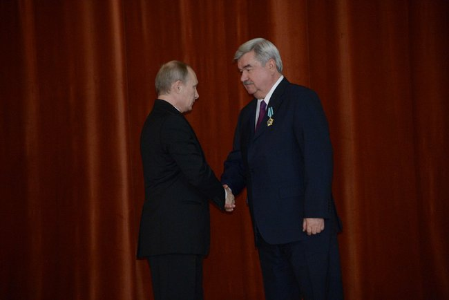 Владимир Путин выступил на совещании послов и постоянных представителей Российской Федерации.